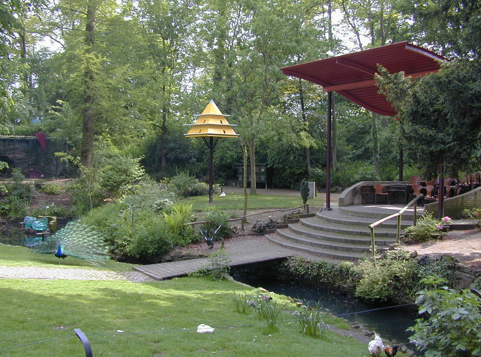 Rijsterborgherpark of Oude Plantsoen: Muziektent op het Vogeleiland